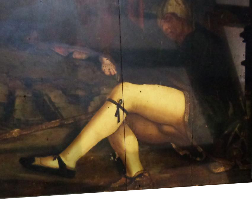 Trabalho de restauro do Laboratório José de Figueiredo.